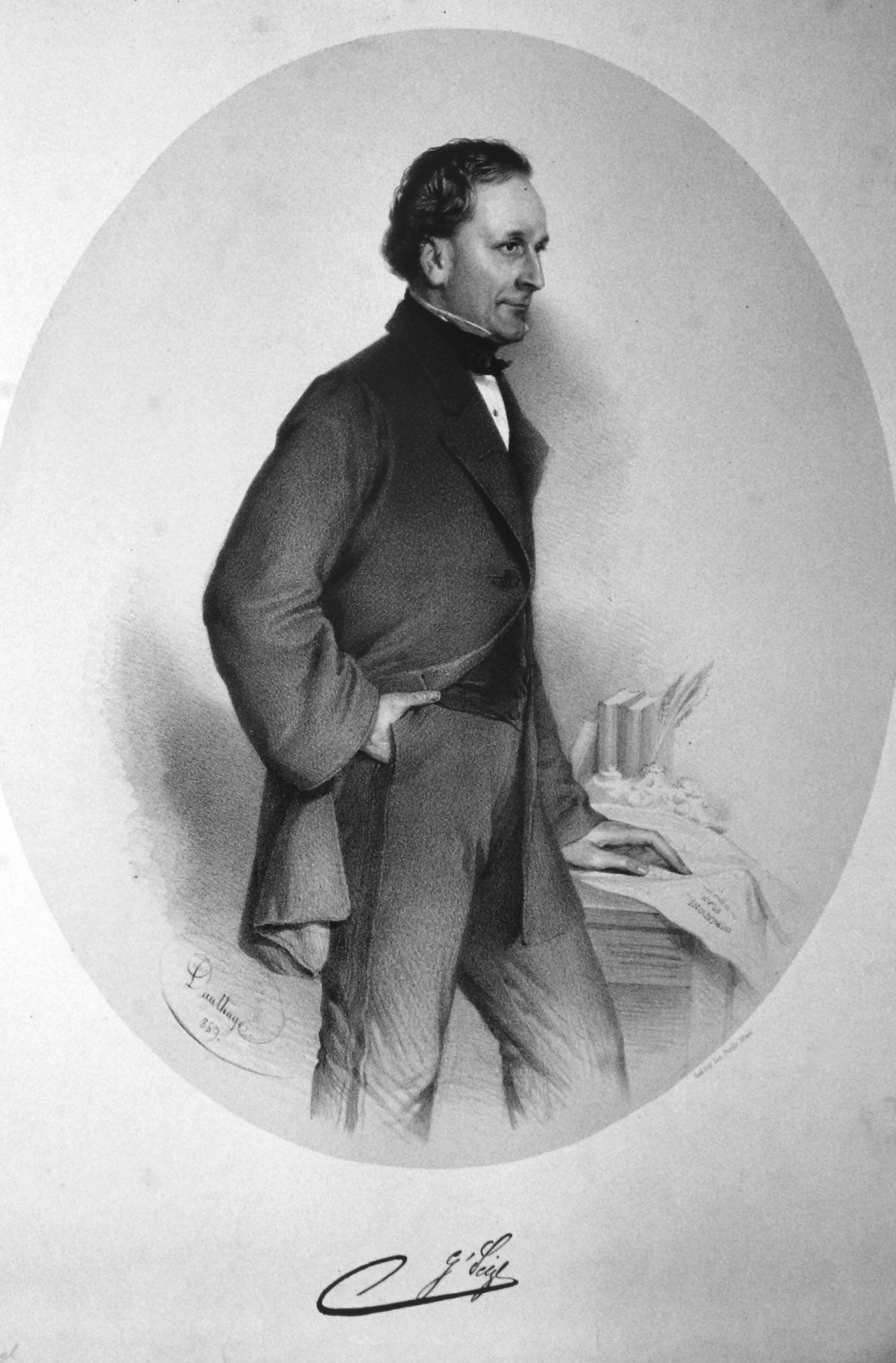 Georg Sigl (1811-1887), österreichischer Industrieller. Lithographie von Adolf Dauthage, 1857